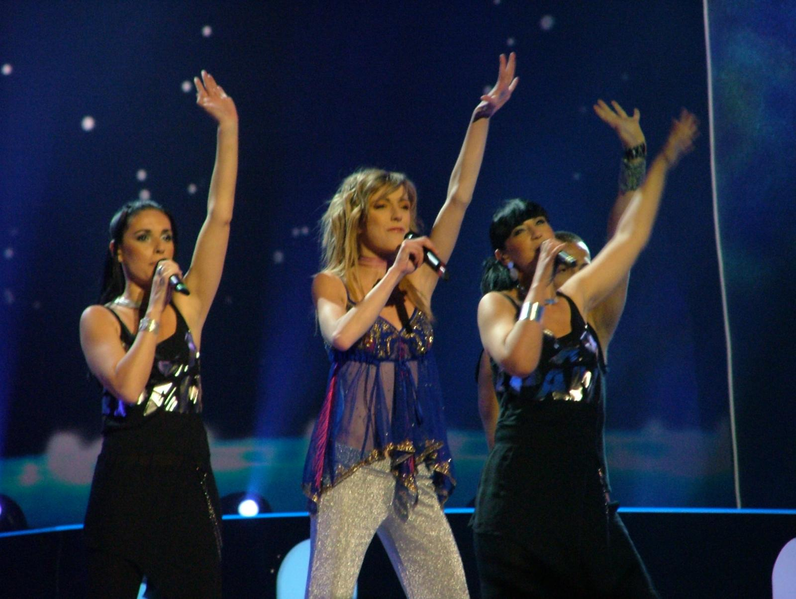 La nostre incombustible Marta Roure